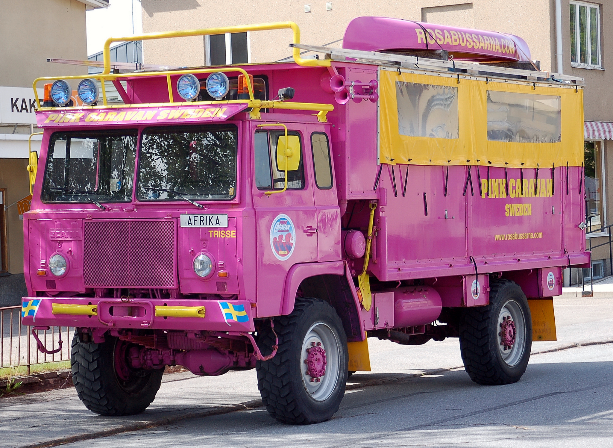 SCANIA SBA 111A 134 Färg: LRÖD Fordonsår: 1976 Chassinummer: 331510 Tekniska data Kaross: Flak - Lämmar - Kapell Växellåda: AUTOMAT/TILLSATS Antal passagerare, max: 2 Tjänstevikt, kg: 8820 Totalvikt, kg: 13400 Max lastvikt, kg: 4580 Kopplingsanordning : KROK Lastutrymmets längd, mm: 4200 Längd, mm: 6750 Bredd, mm: 2490 Drivmedel 1: DIESEL Motoreffekt, kw: 162,0